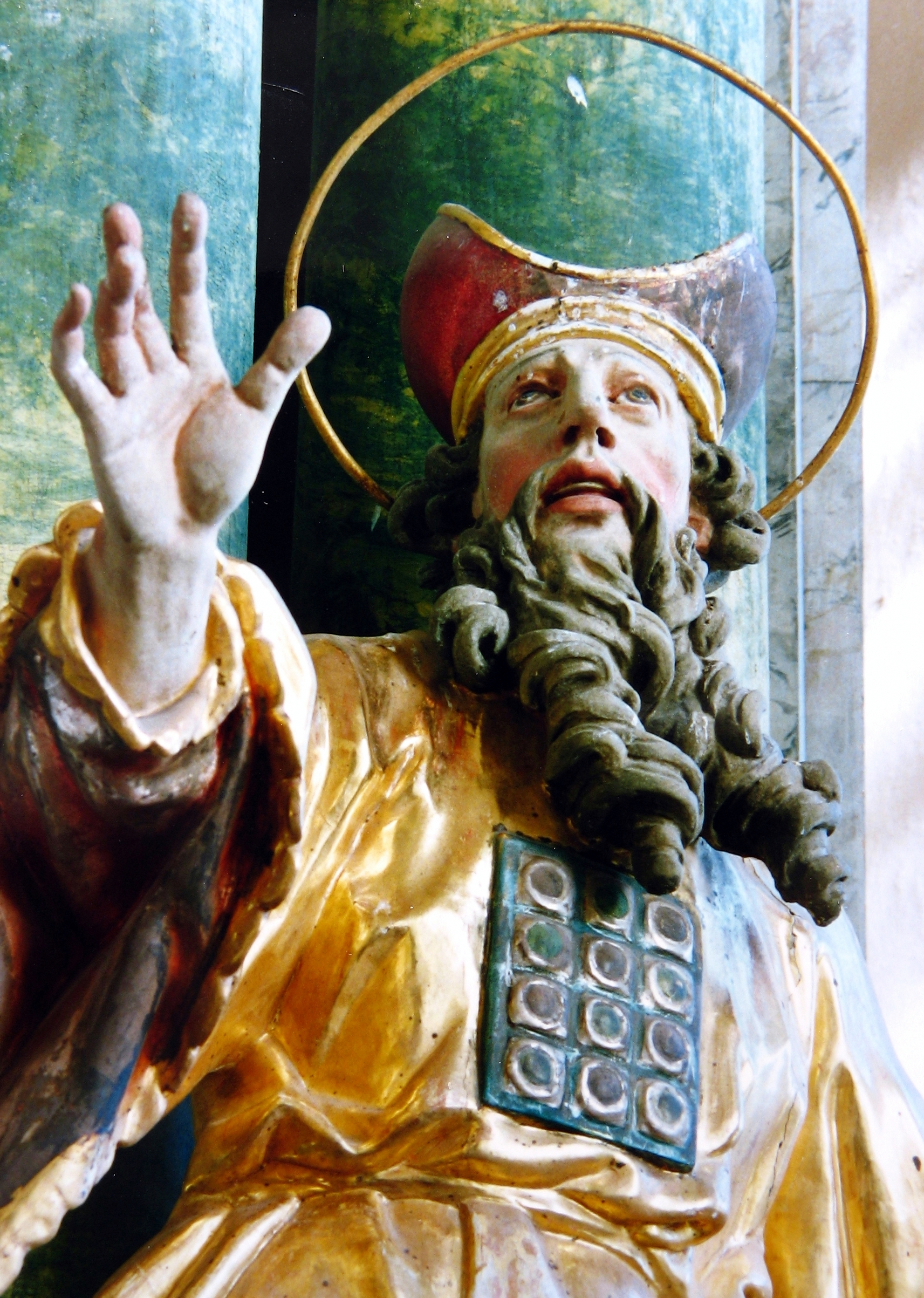 Hl. Zacharias (Detail) von Anton Sturm in der Wallfahrtskirche in Burggen